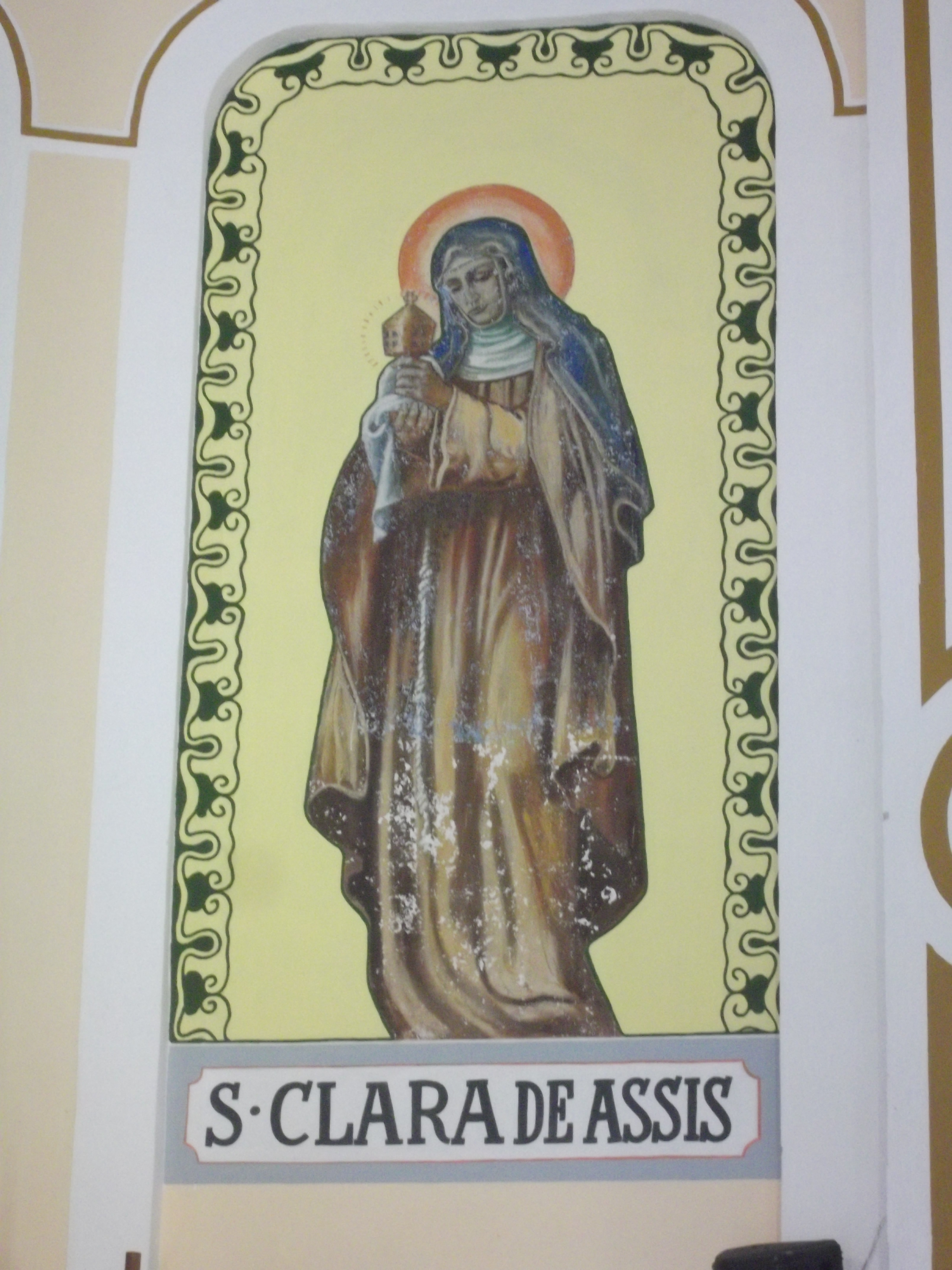 Basílica de São Francisco das Chagas (Canindé)